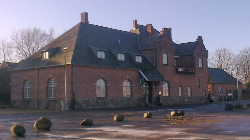 Strømmen station set fra vejsiden